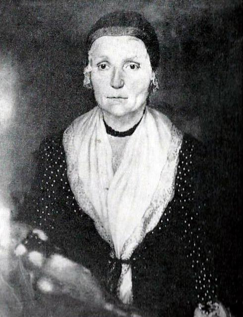 Porträt Dorothea Brixi (1686–1762), Ehefrau von Hans Georg Benda, Stammmutter der Musikerfamilie Benda (Familien).